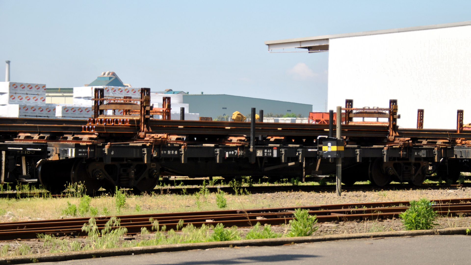 チキ7000形（7019）